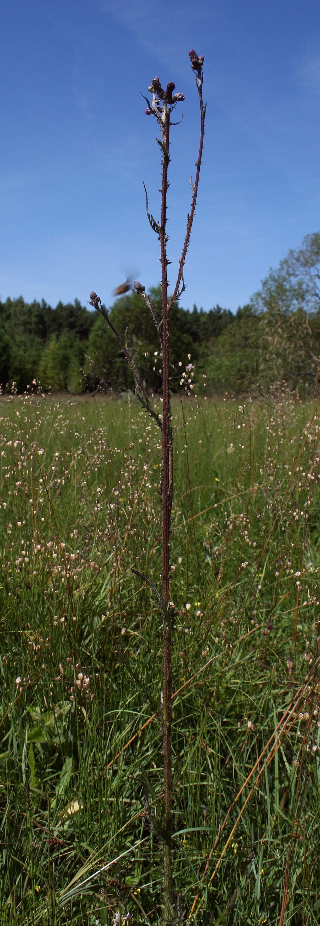 Park Narodowy Bory Tucholskie, ostrożeń błotny - pokrój